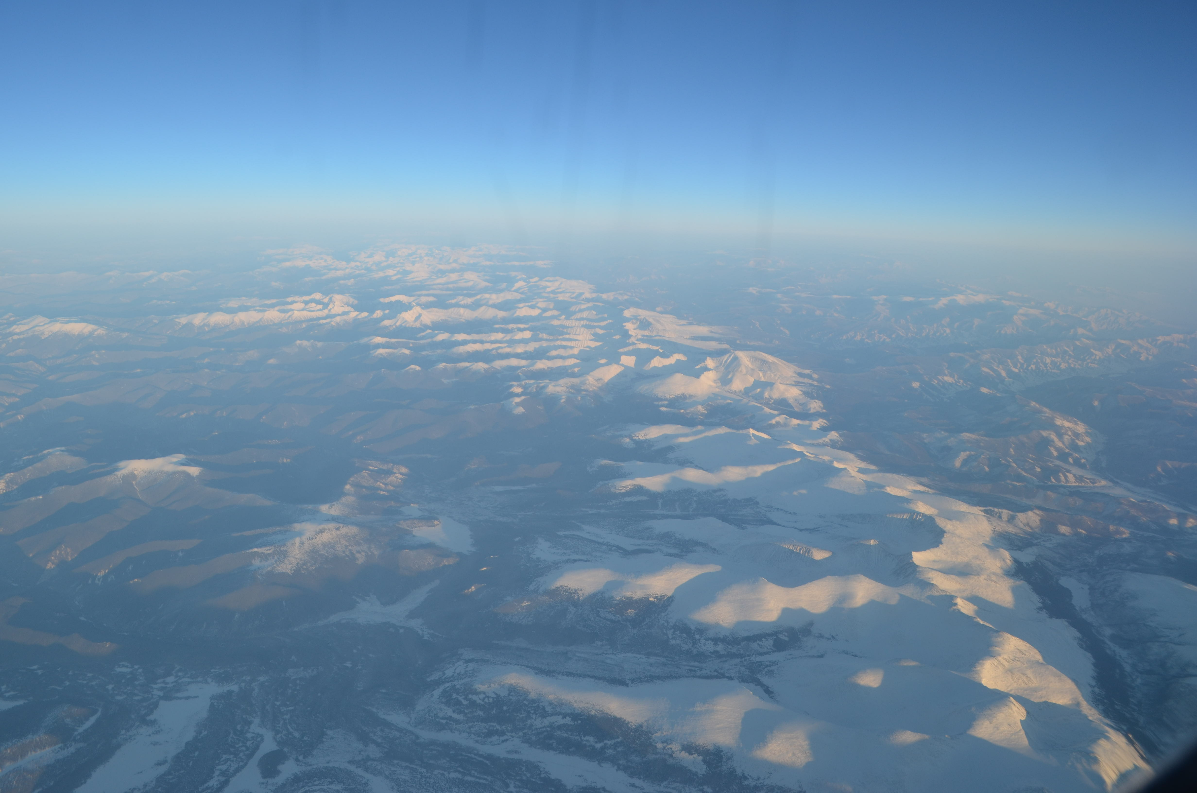 Хребет Сайлыг-Хем-Тайга, далее Саянский хребет